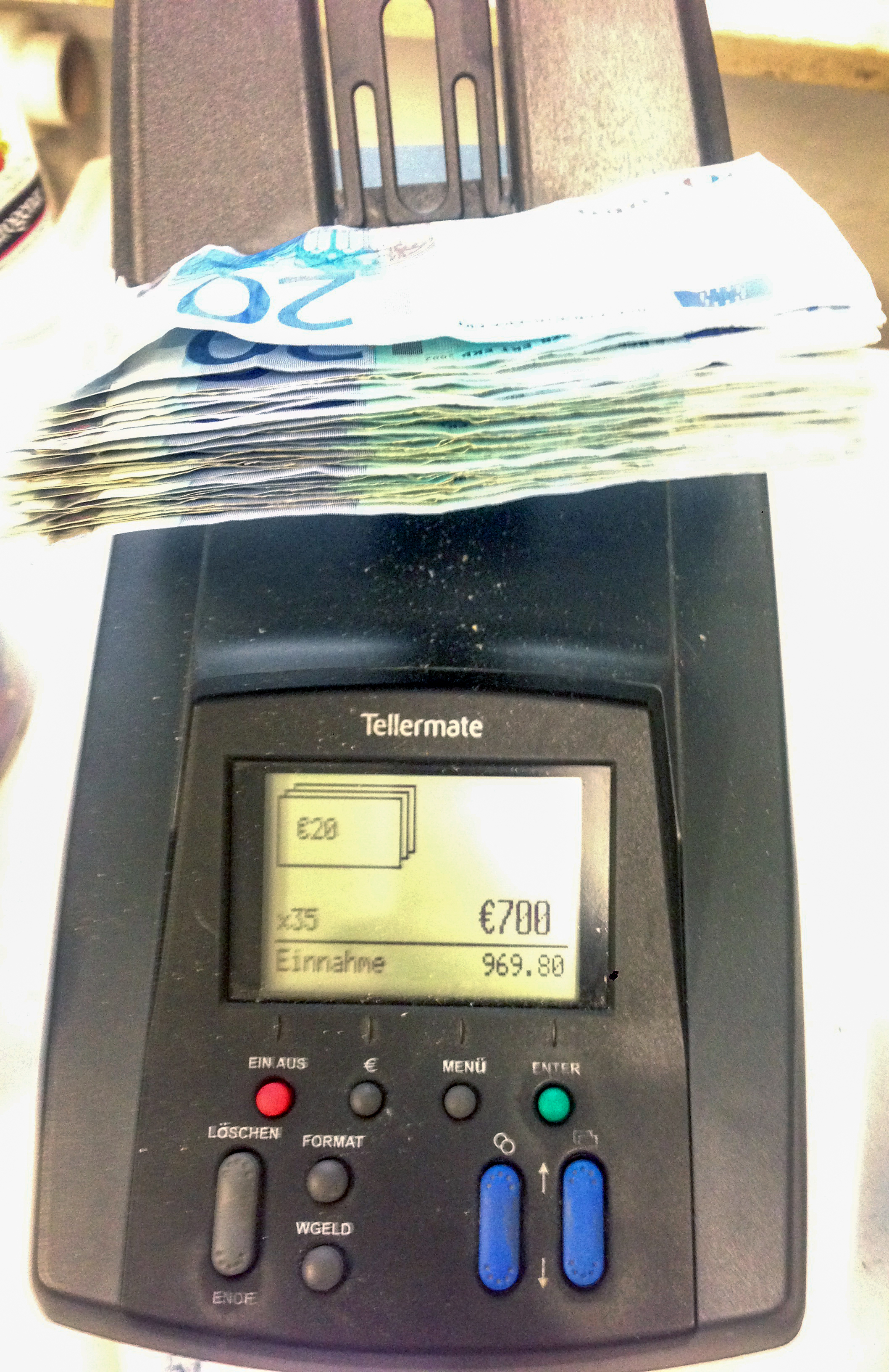 Kassenwaage eines Deutschen Handelsunternehmens